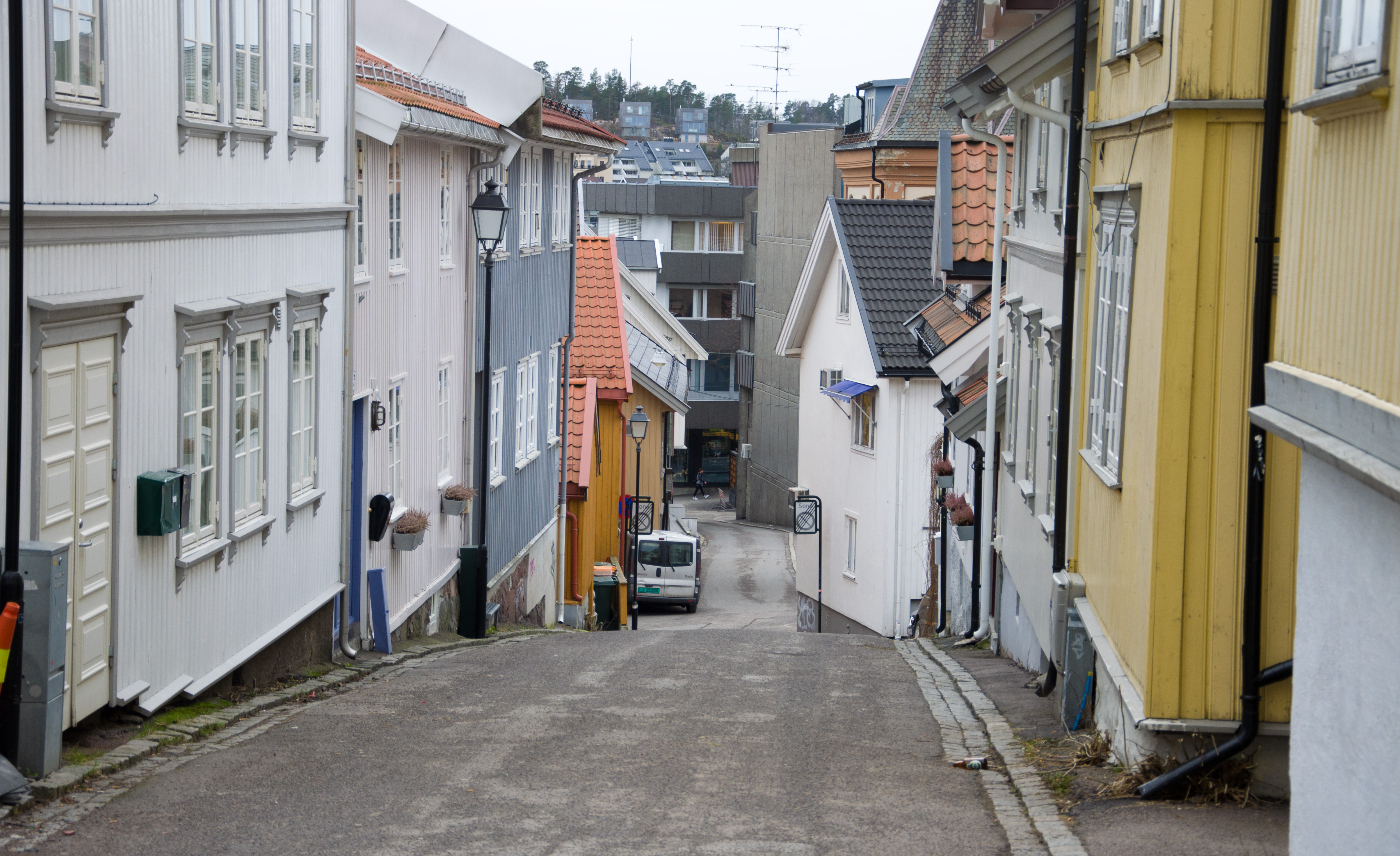 Tjømegaten i Tønsberg